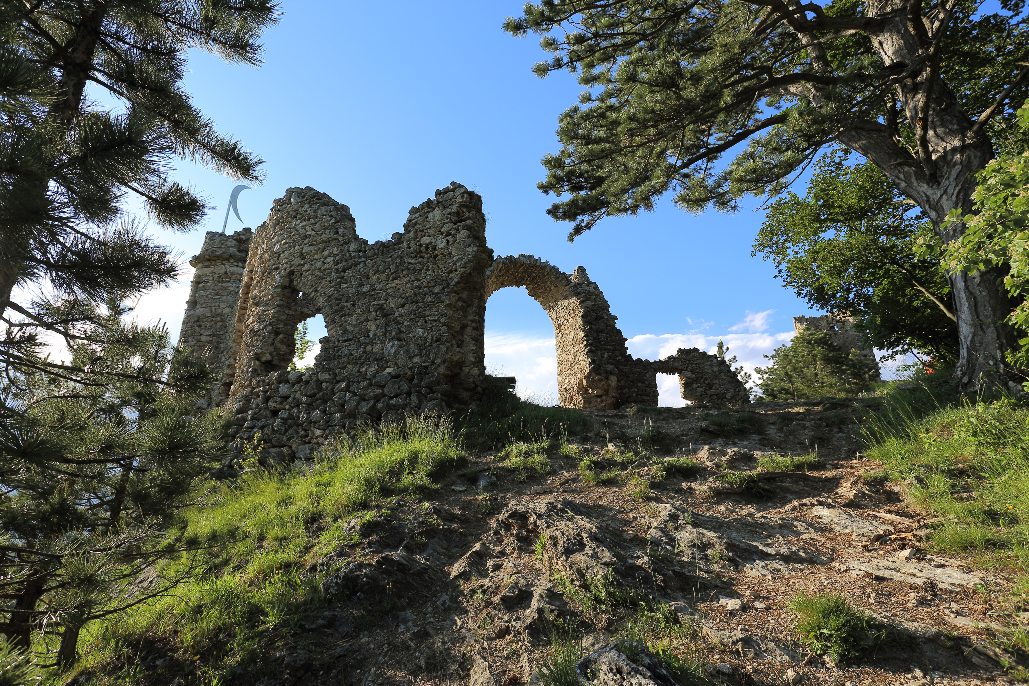 Künstliche Ruine, die über der steilen Felswand Türkensturz in Gleißenfeld, ein Ortsteil der niederösterreichischen Gemeinde Scheiblingkirchen-Thernberg, 1824 errichtet wurde.